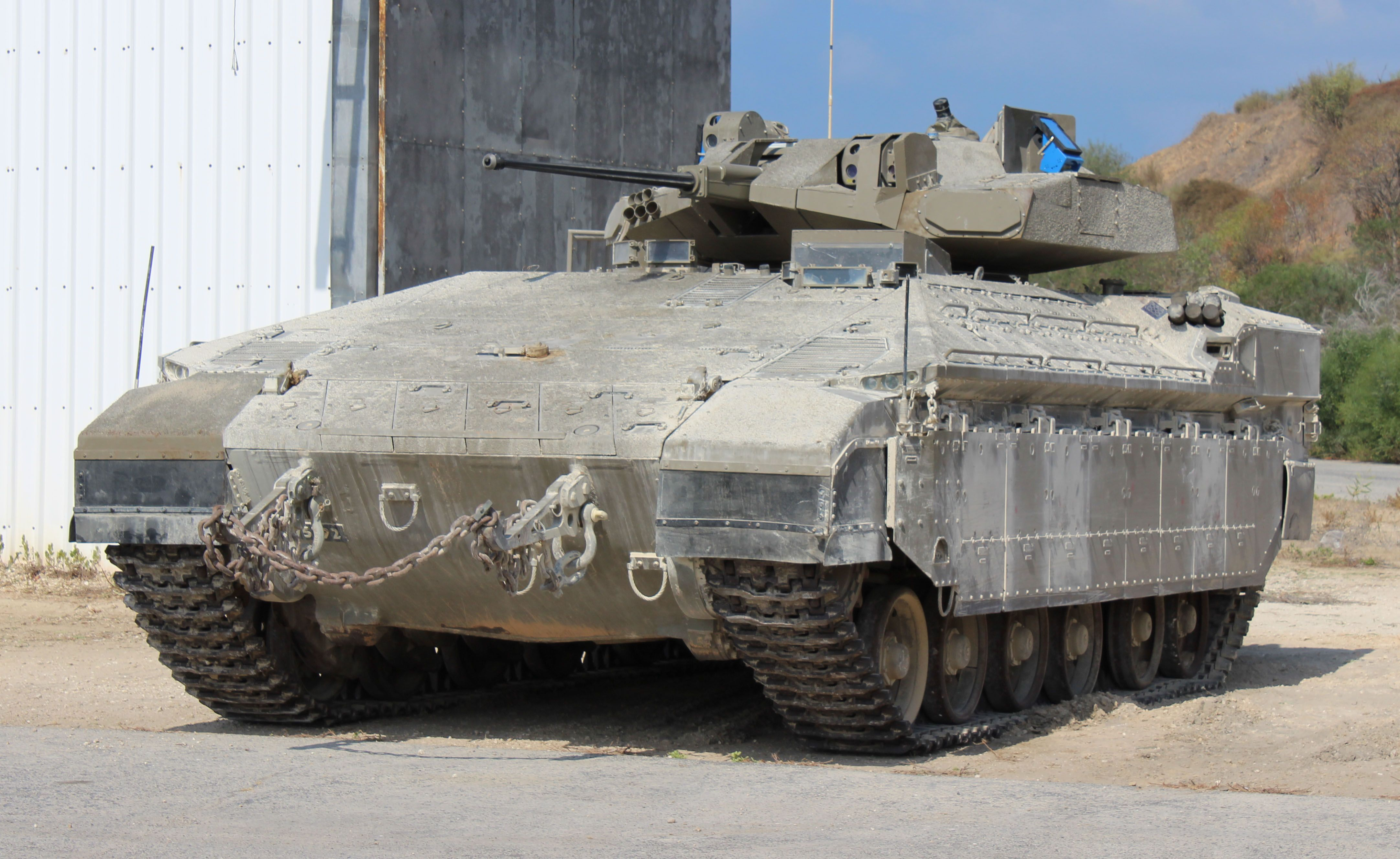 מערכת "מעיל רוח" של רפאל על נמ"ר